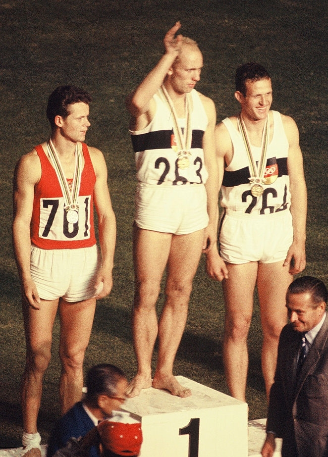 Rein Aun, Willi Holdorf, Hans-Joachim Walde, 1964 Olympics